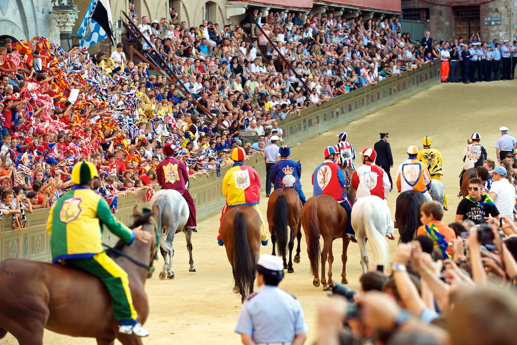 Le Contrade che corrono il Palio dell'Assunta 2011 verso i canapi per una prova.